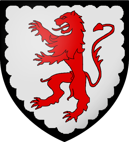 Gouverneur du Dauphiné